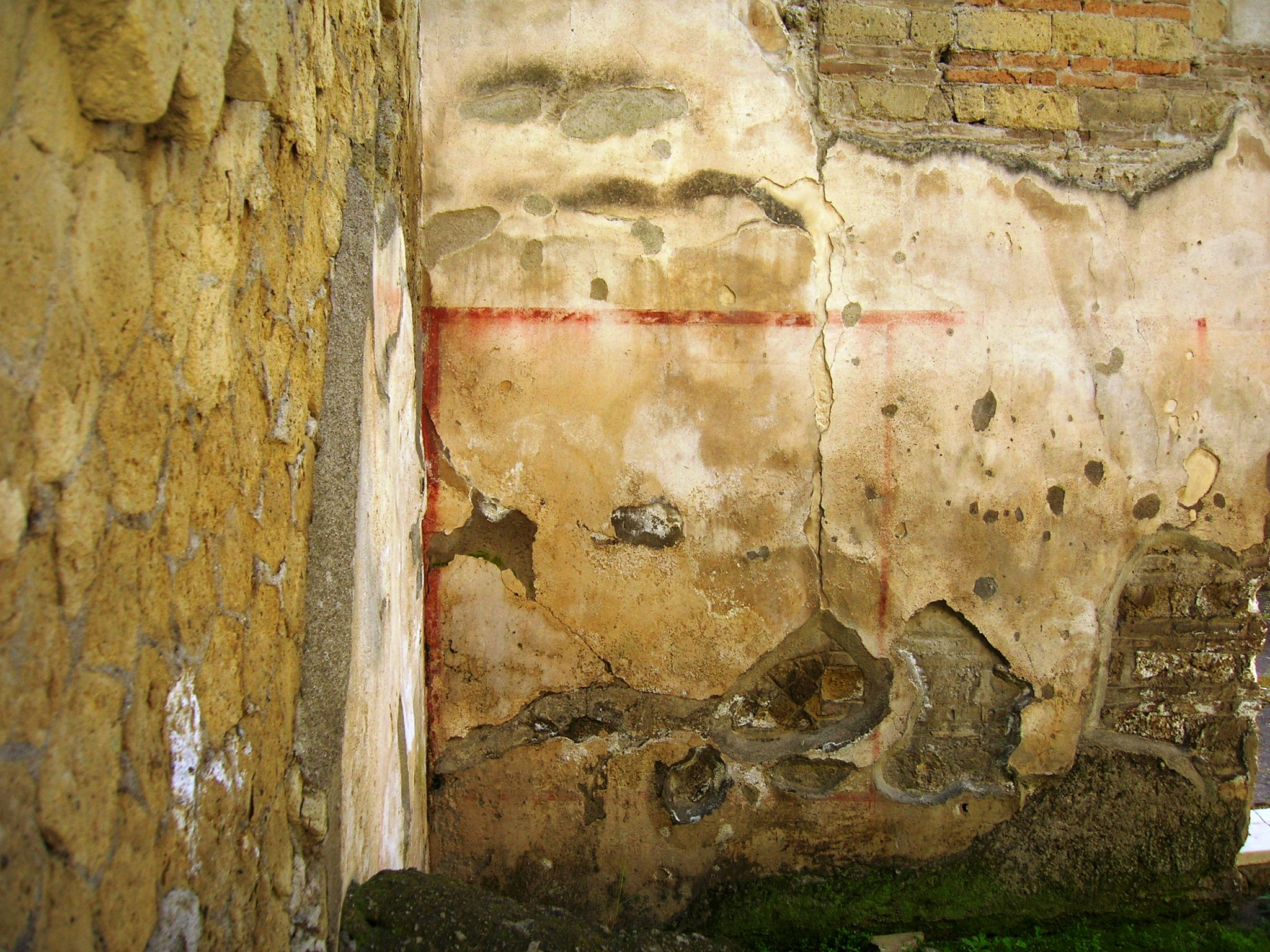 Casa dei Due Atri